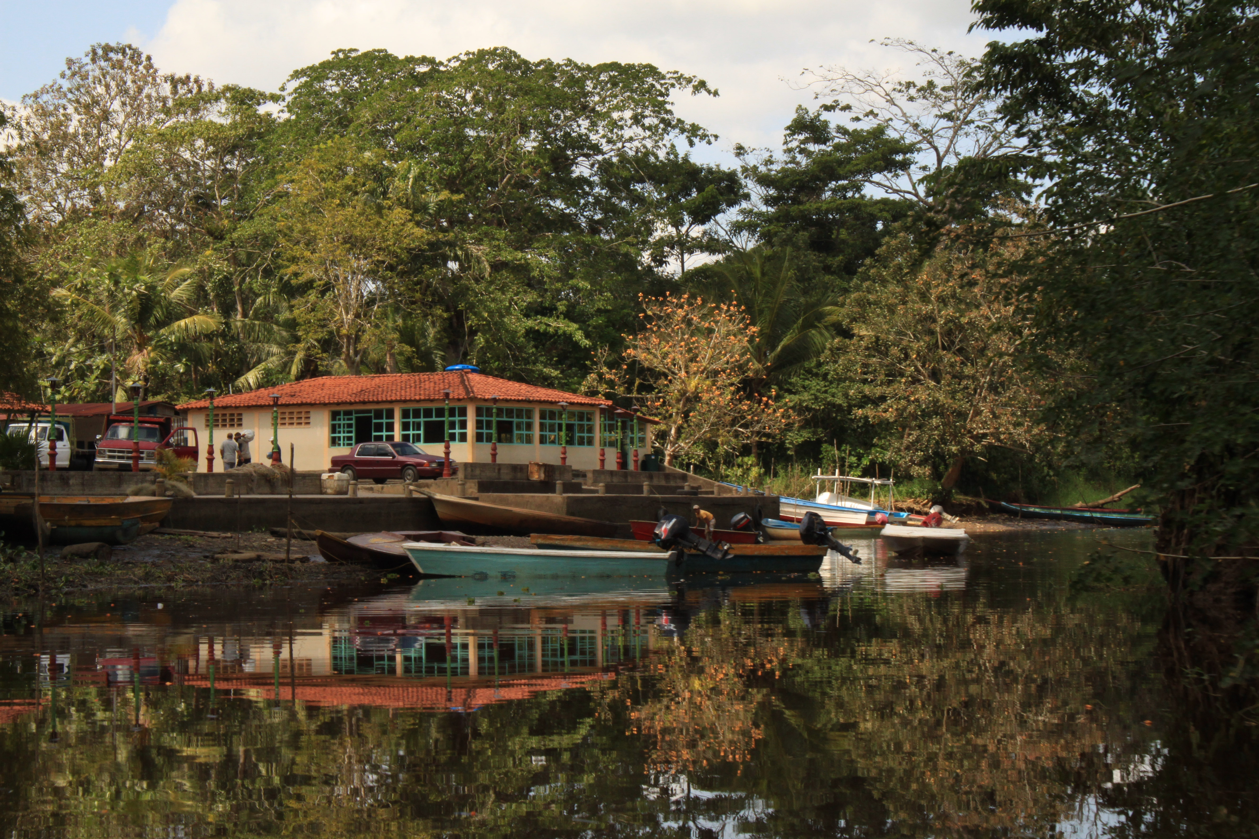 Puerto del pueblo de Ajies en el Parque Nacional Turuepano